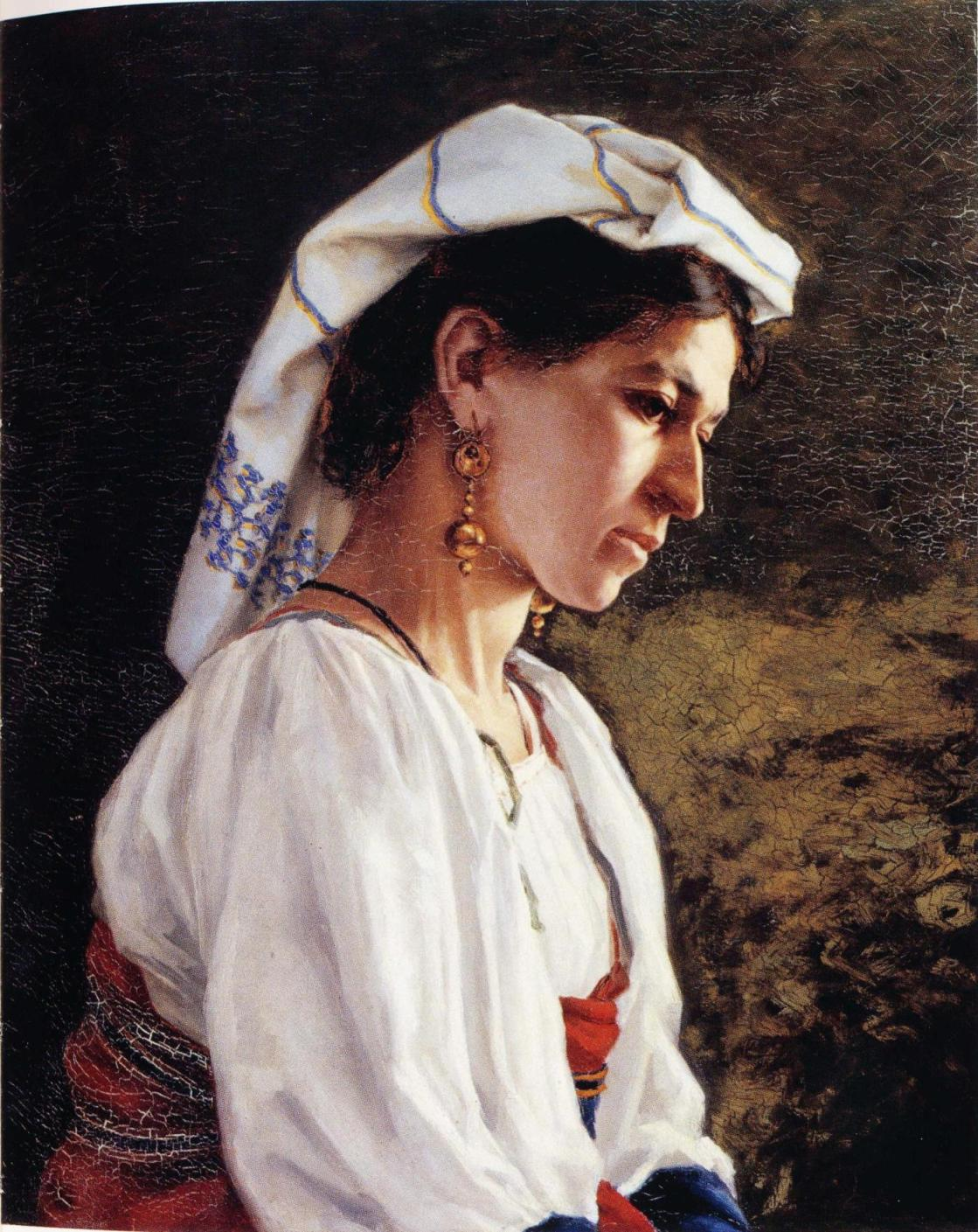 Hilda Granstedtin maalaus.